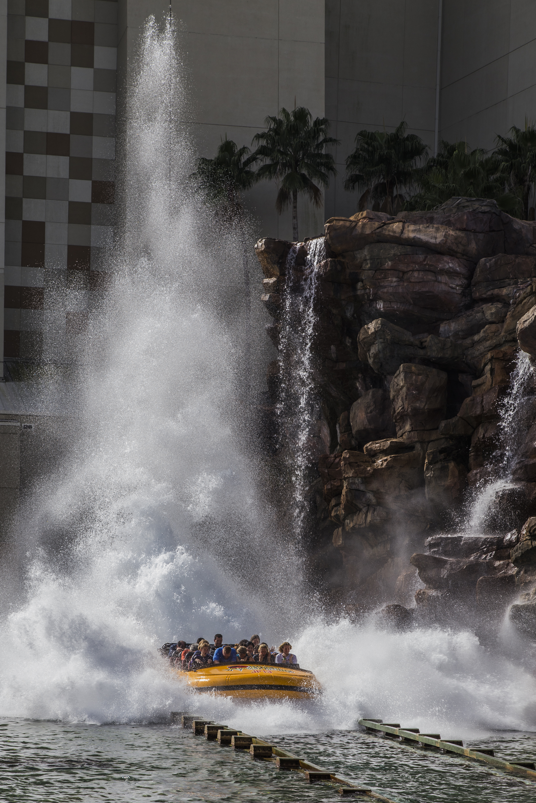 Florida Center, Orlando, FL, USA